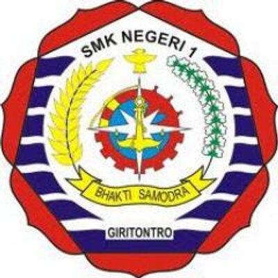 Logo SMKN 1 Giritontro